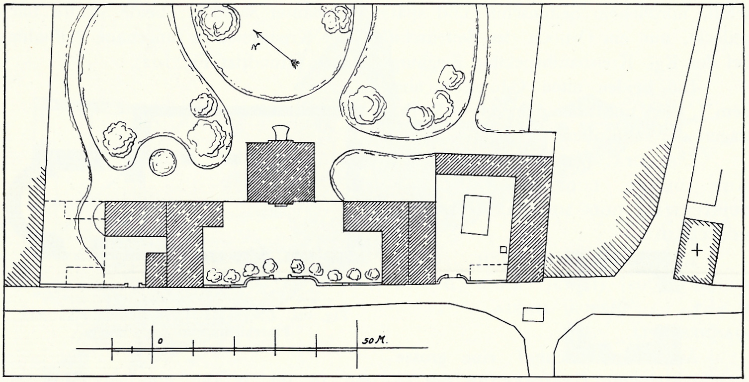 Lippesches Landhaus, Oberkassel: Lageplan